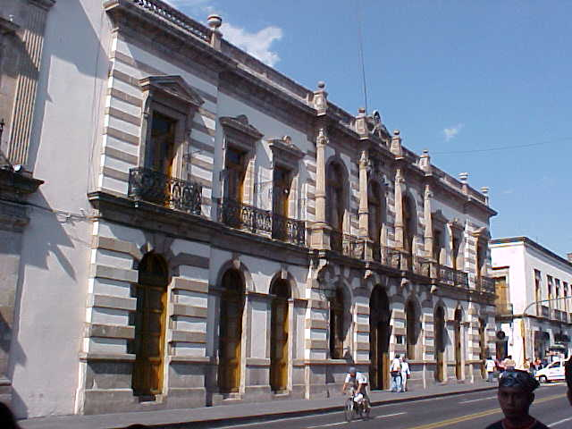 Palacio Legislativo en Morelia (Legislative Palace in Morelia)